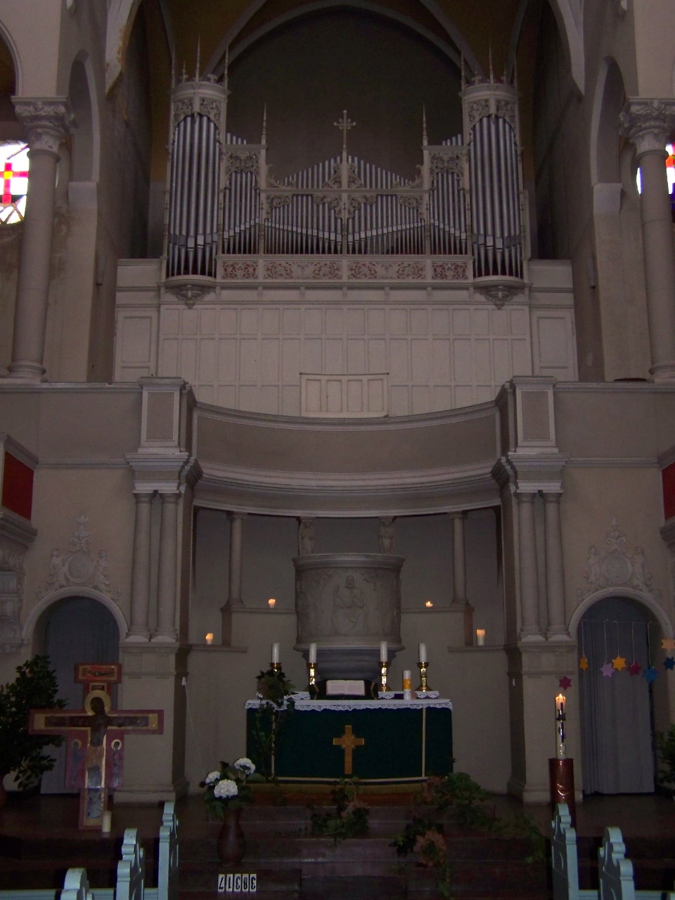 Berlin, Segenskirche Prenzlauer Berg, Altar und Orgel (2008-09-20).JPG